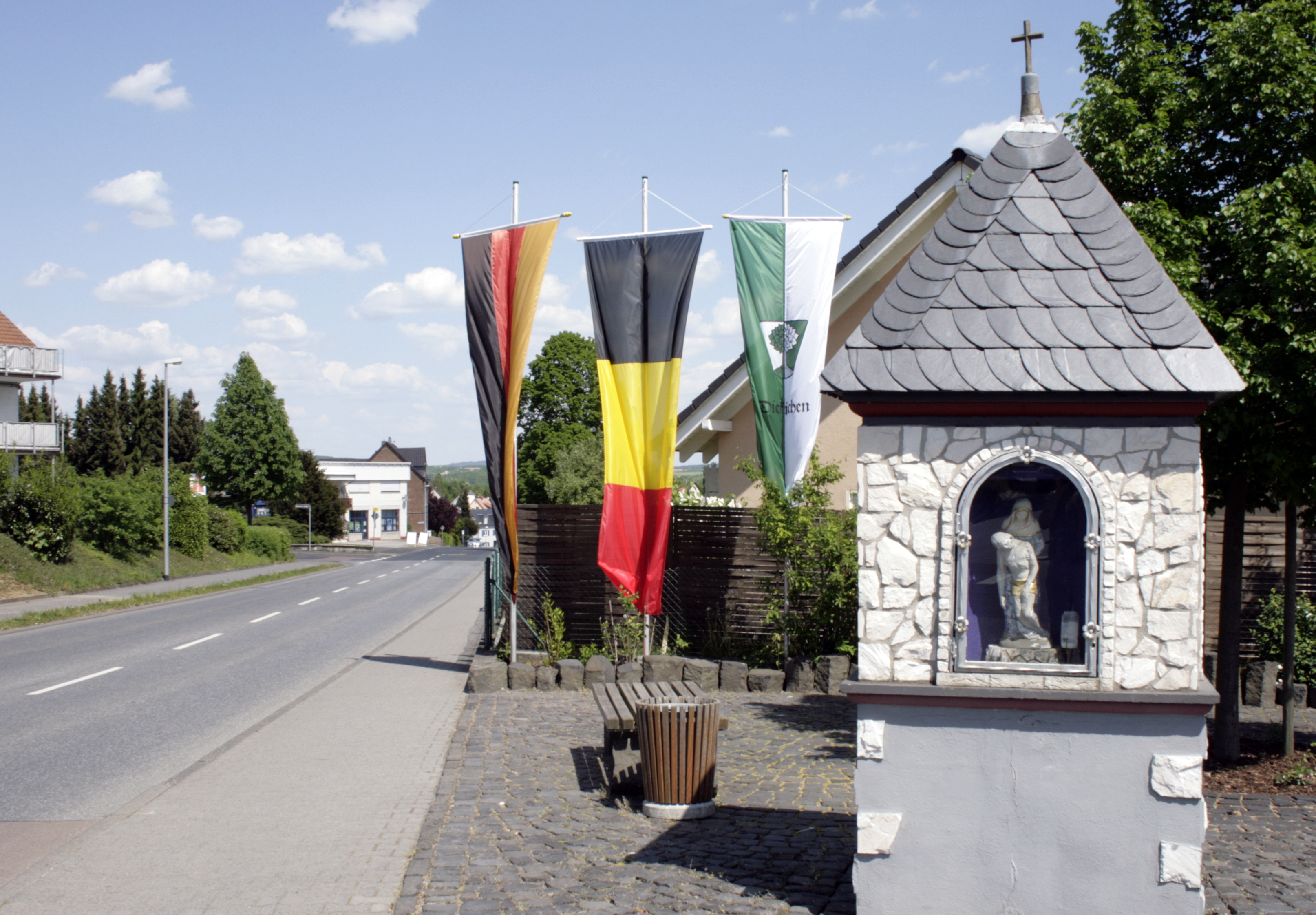 Ortseingang von Dietkirchen, Deutschland